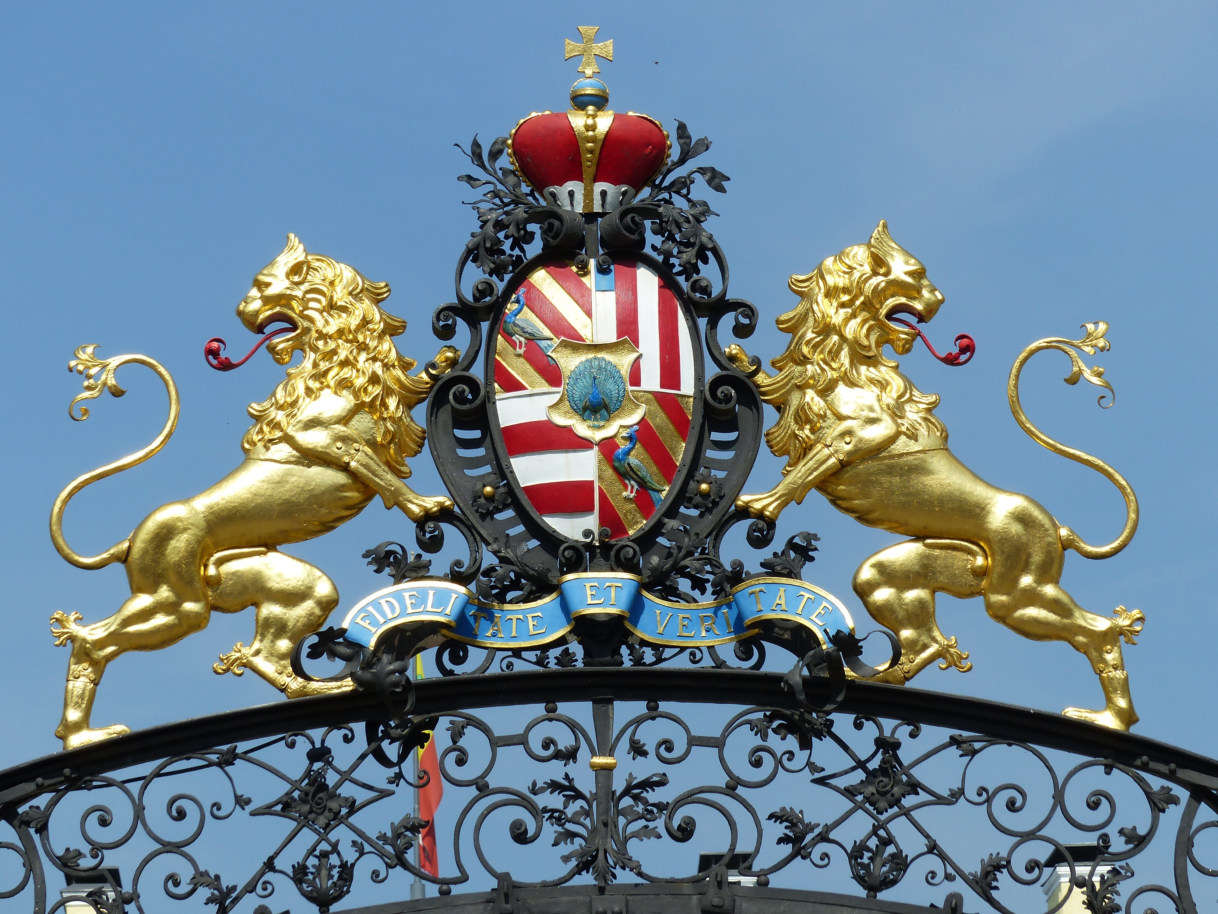 Wappen am Tor zum Residenzschloss der Fürsten zu Wied, Neuwied